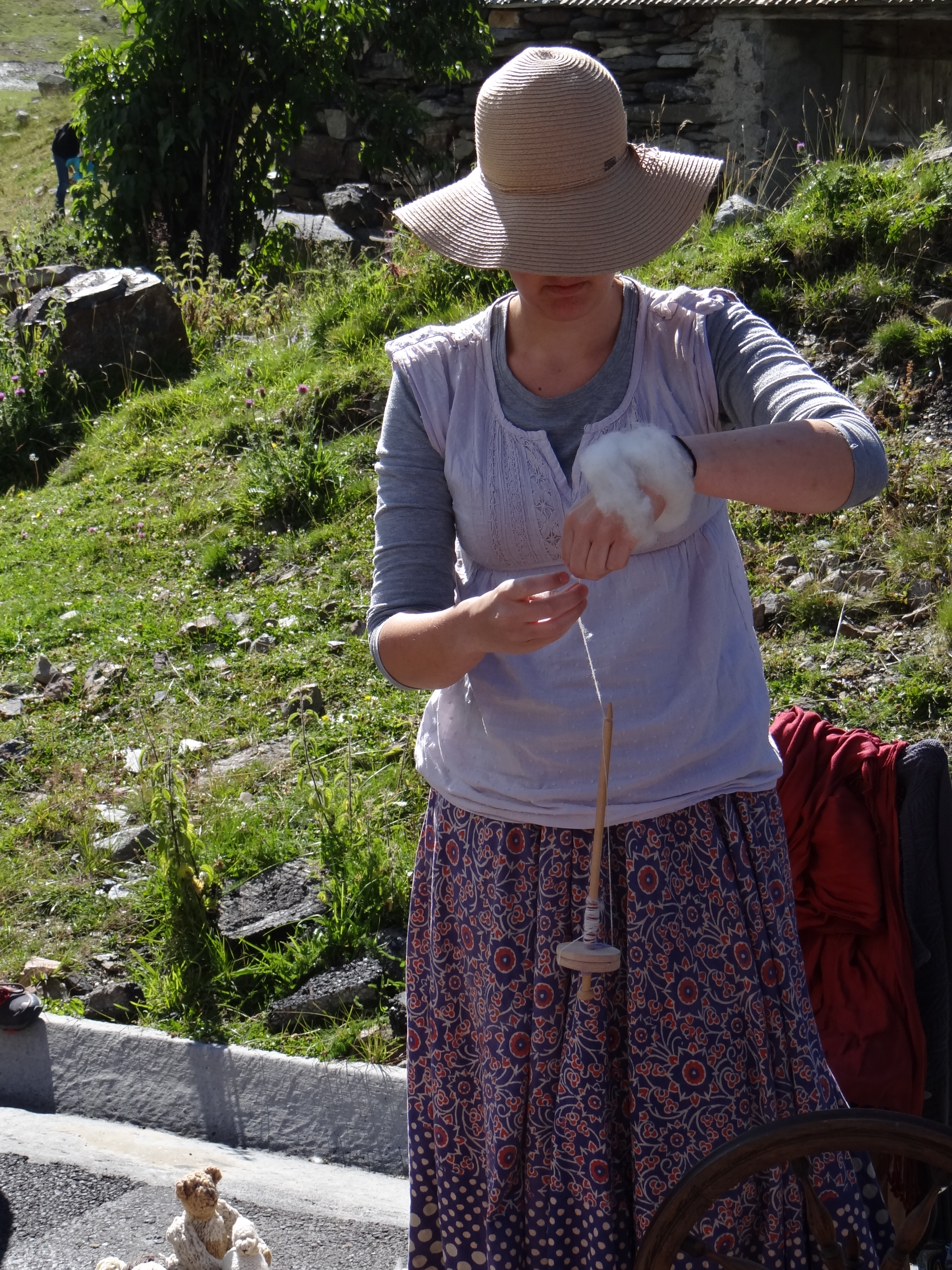 Barèges - Fête des bergers 15 Aout 2014 - Travail de la laine - Filage au fuseau